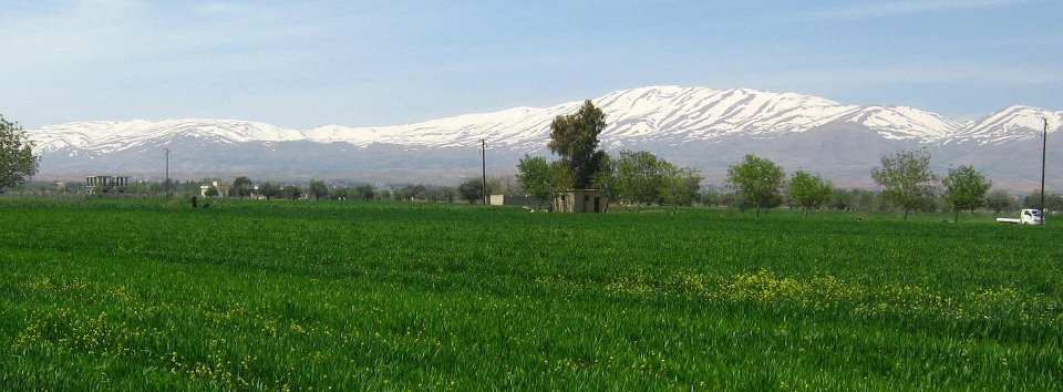 حقول مدينة زاكية وجبل الشيخ